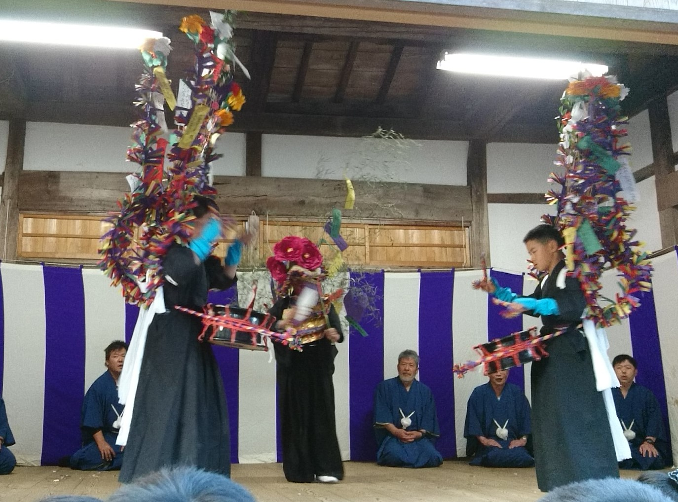 与謝野町 大宮神社